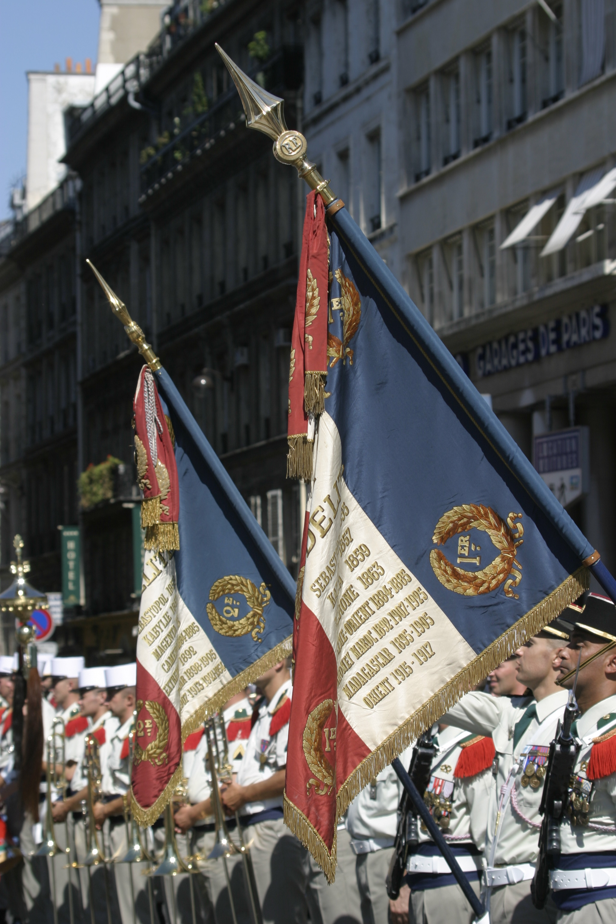 Drapeaux des 1er et 2e Régiment étranger de Légion (France)